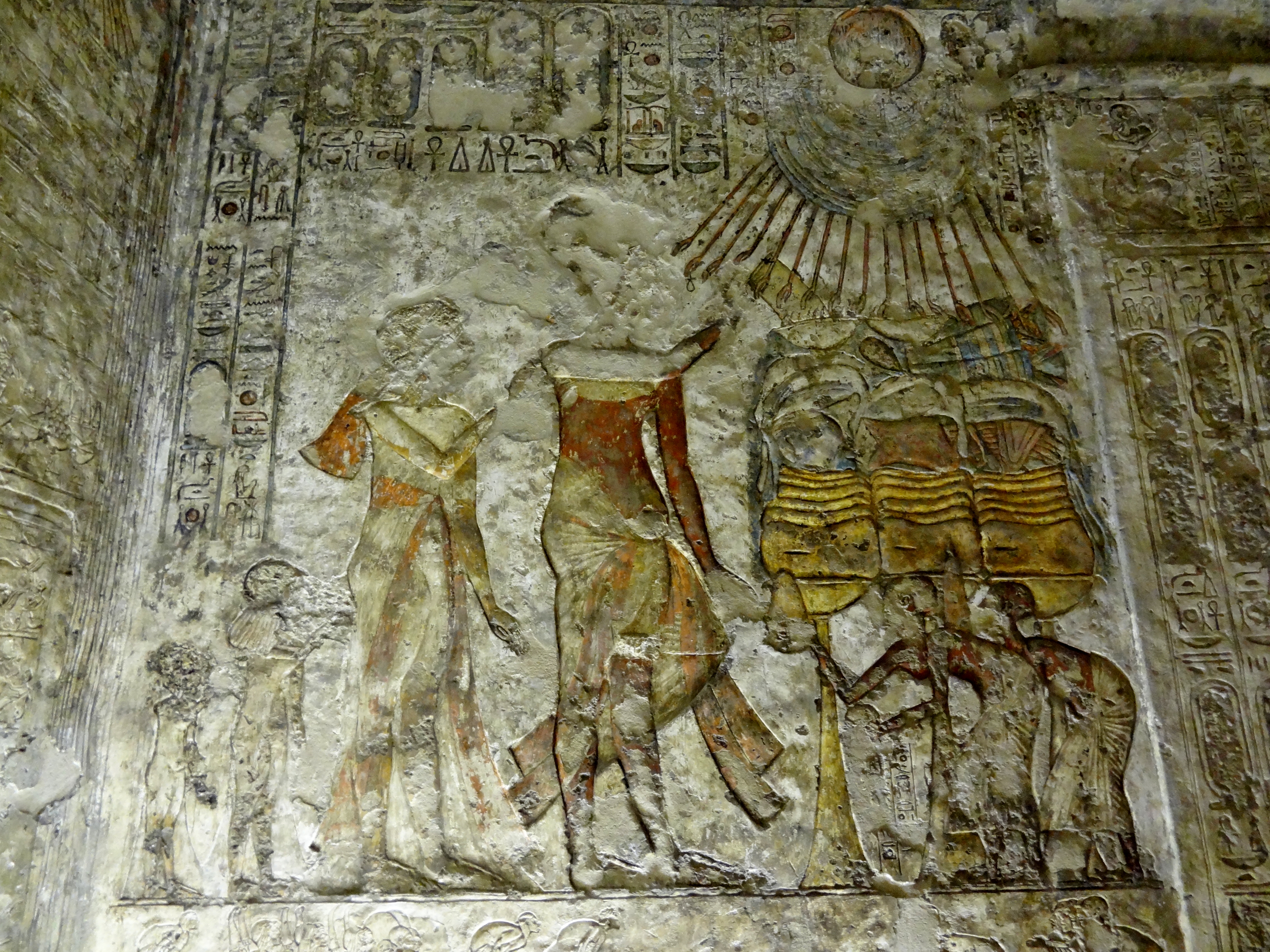 Grab des Merire I. (TA 4) in Tell el-Amarna, Ägypten